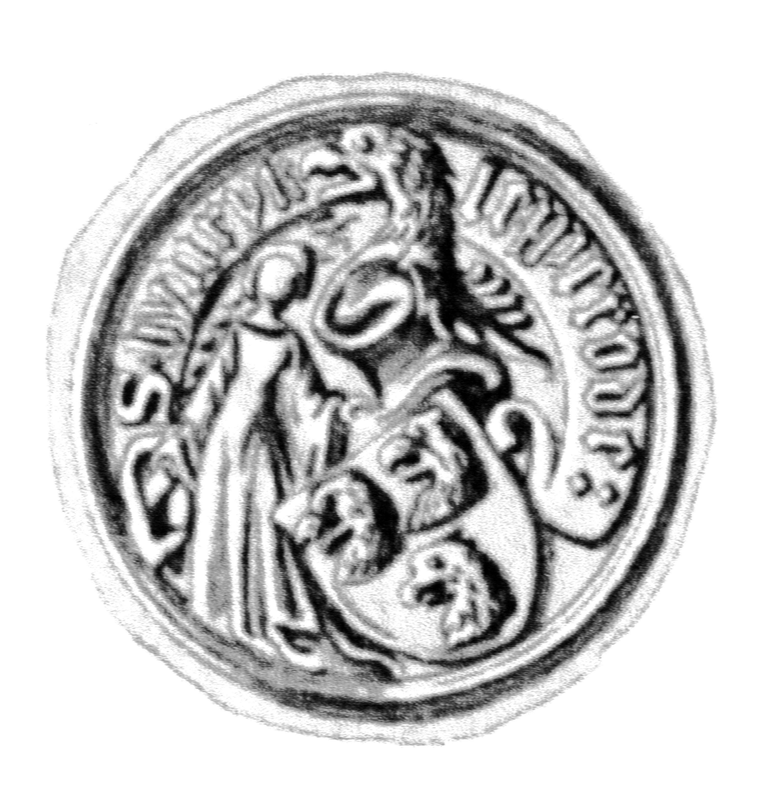 Siegel des Ratsmannes Hinrick Le(i)pperode. Das Siegel stammt aus der Zeit um 1469. Siehe Emil Ferdinand Fehling: Lübeckische Ratslinie, Nr. 524 (Hinrich Lipperade der Ältere).